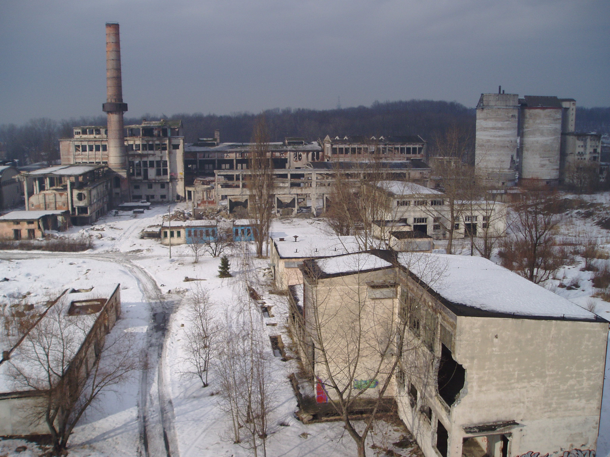 Pozostałości fabryki Naftobudowa, Wola Duchacka (Kraków)